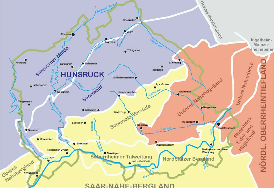 Bildbeschreibung: Karte des Soonwaldes Quelle: eigene Fotografie Datum: 9. August 2006 eingefügt von --Achim Berg 09:50, 9 August 2006 (UTC)